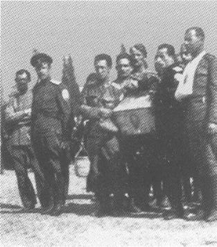 Entierro de Mitrofán Nezhéntsev, fallecido el 30 de marzo (12 de abril) de 1918, en los alrededores de Krasnodar,.